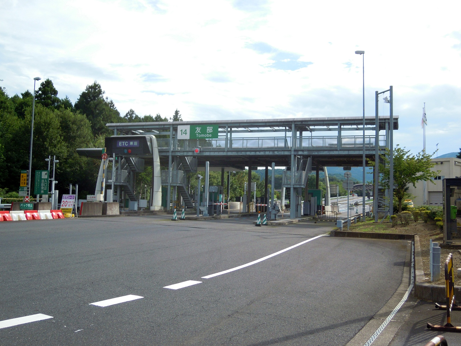 茨城県笠間市にある北関東自動車道の友部インターチェンジ料金所を一般道側から。